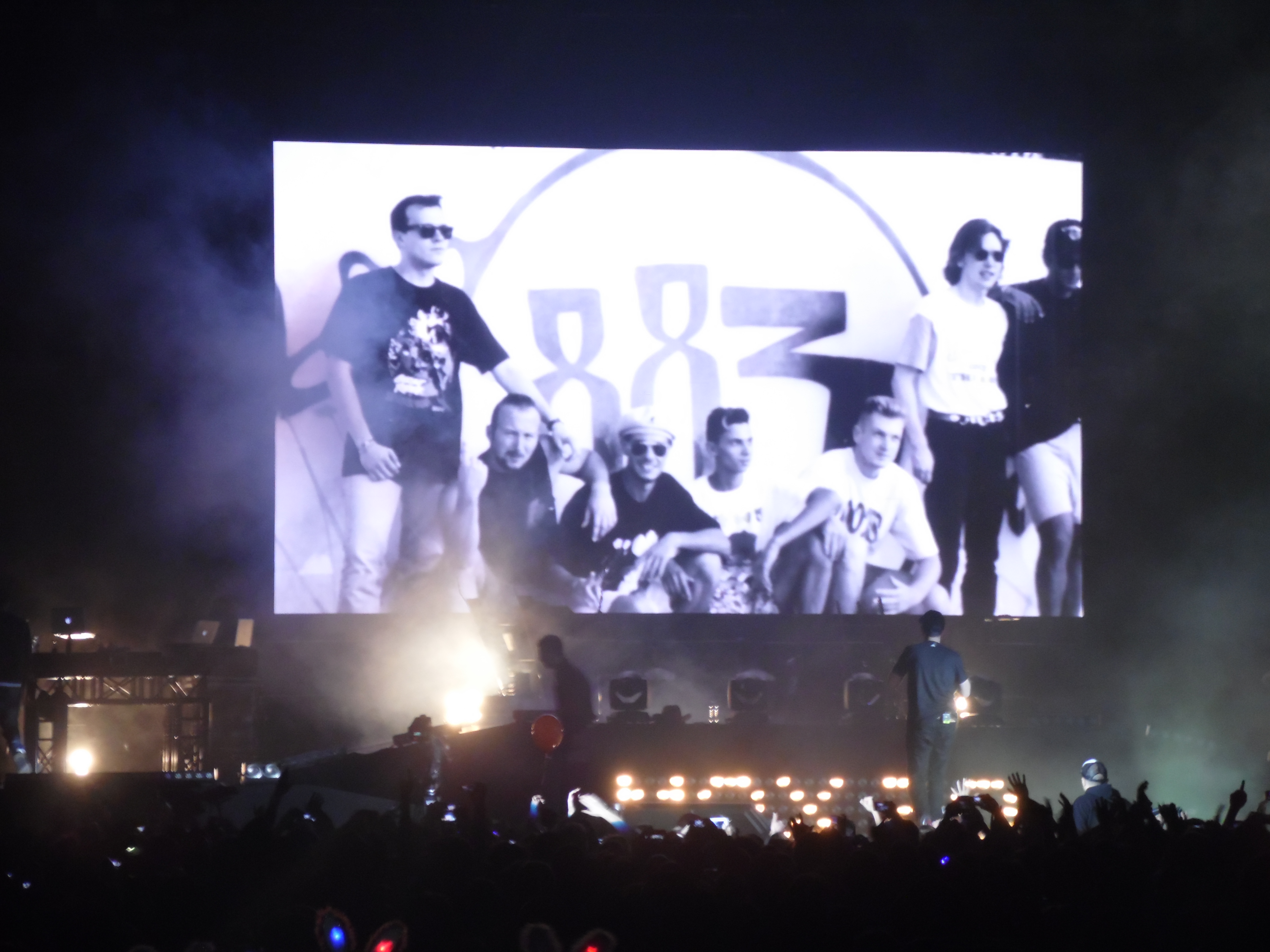 Una foto degli 883 trasmessa su megaschermo durante un concerto di Max Pezzali nel 2013